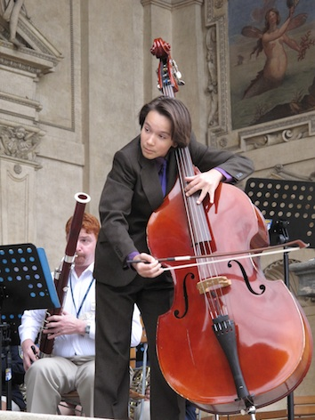 Kontrabasista Indi Stivín